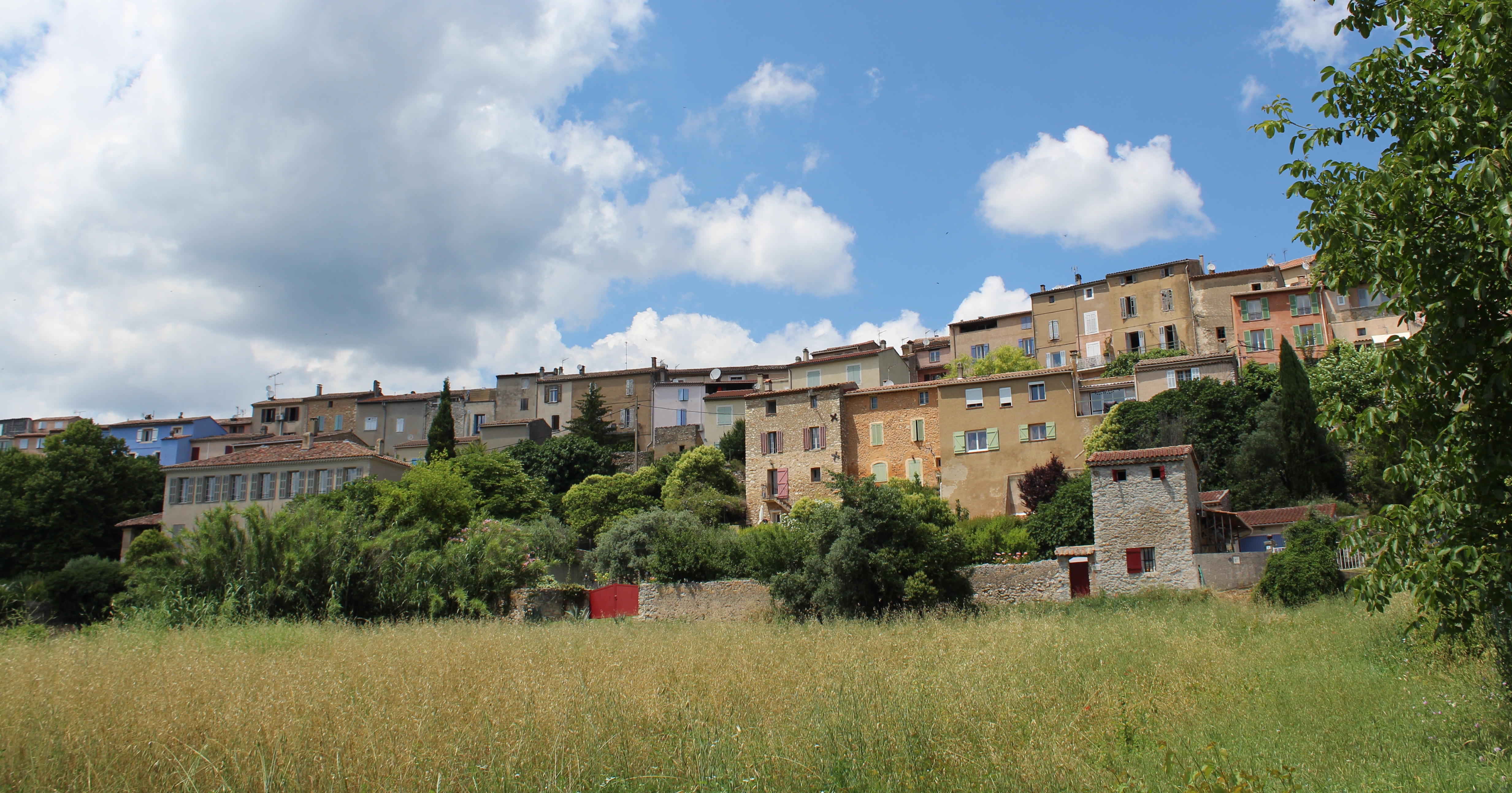 Vus du village